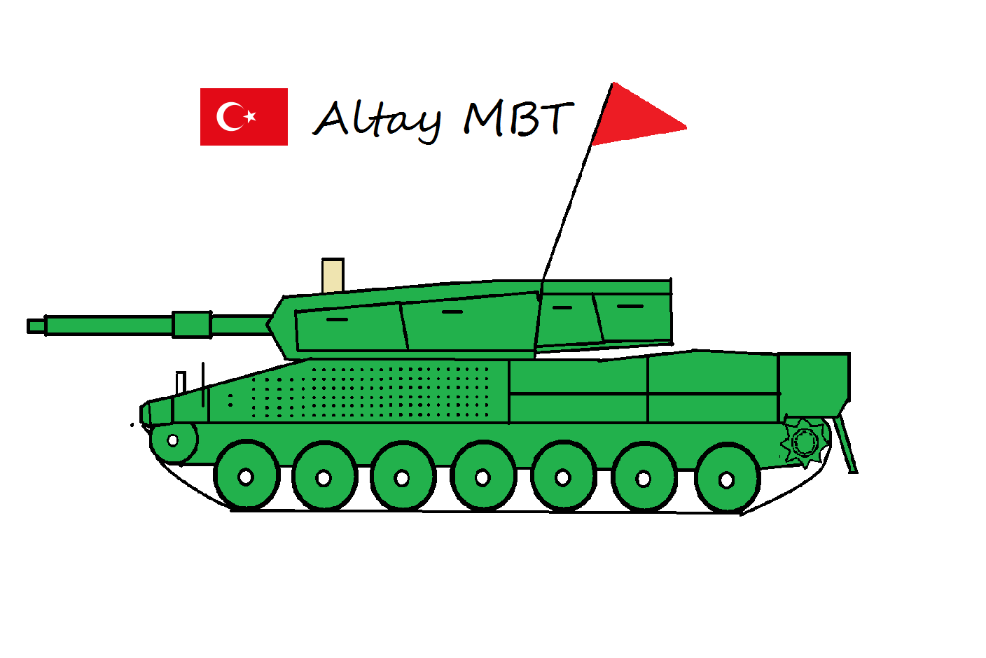 土耳其的zh:阿勒泰戰車